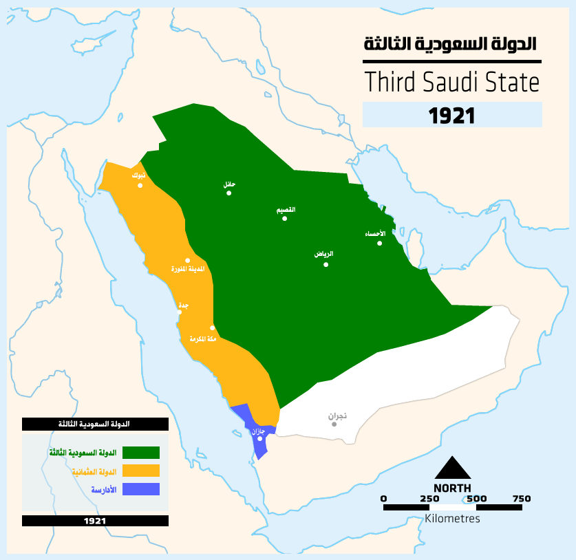 خارطة الدولة السعودية الثالثة في اقصى اتساعها عام 1921